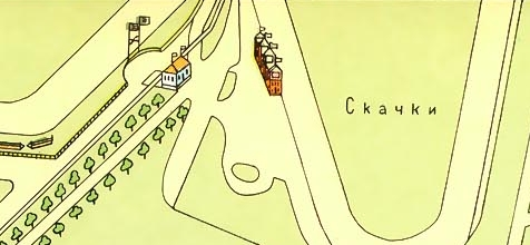 платформа Скачки на плане Петербурга 1913 года